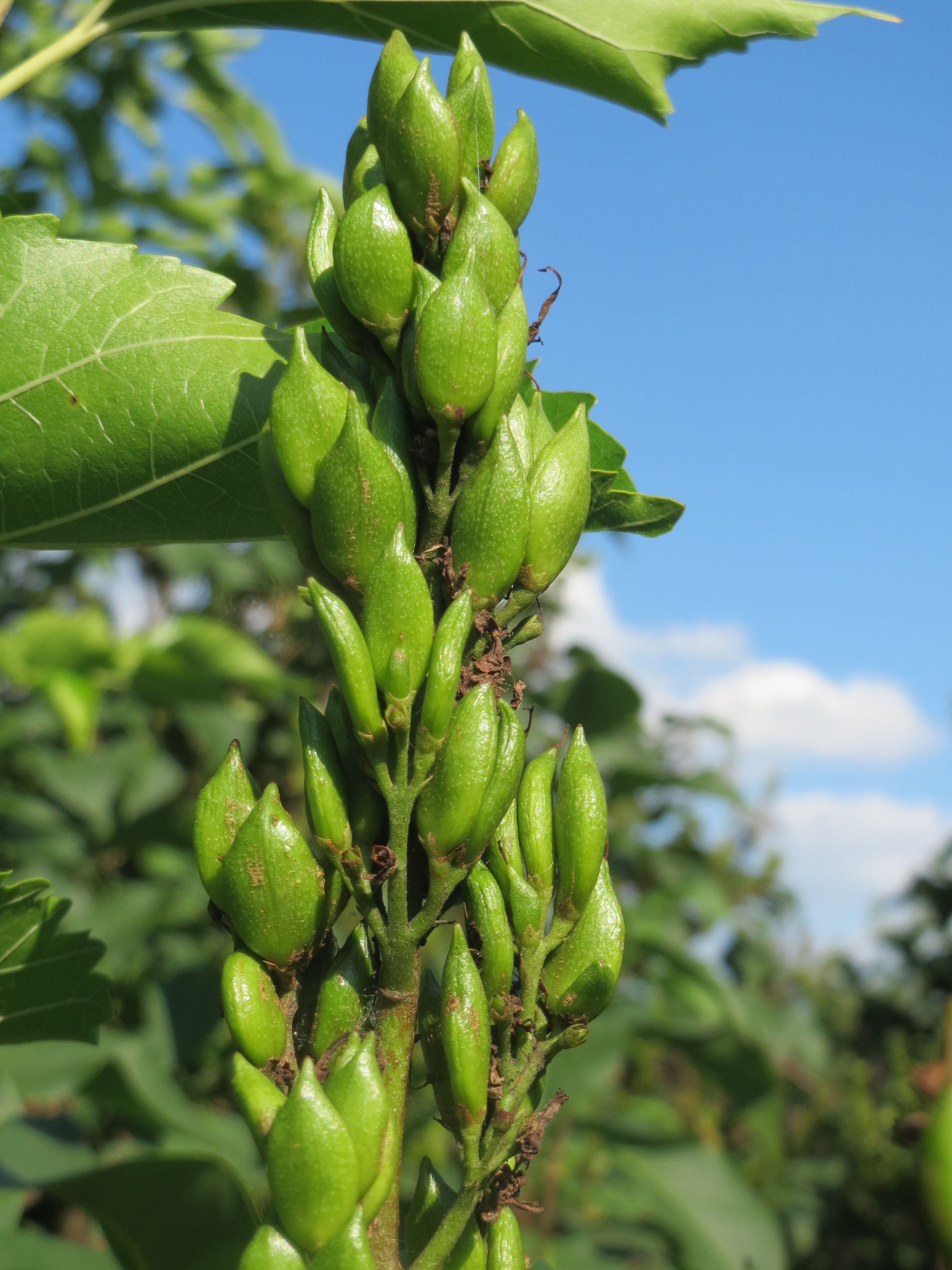 Gemeiner Flieder (Syringa vulgaris) in Hockenheim